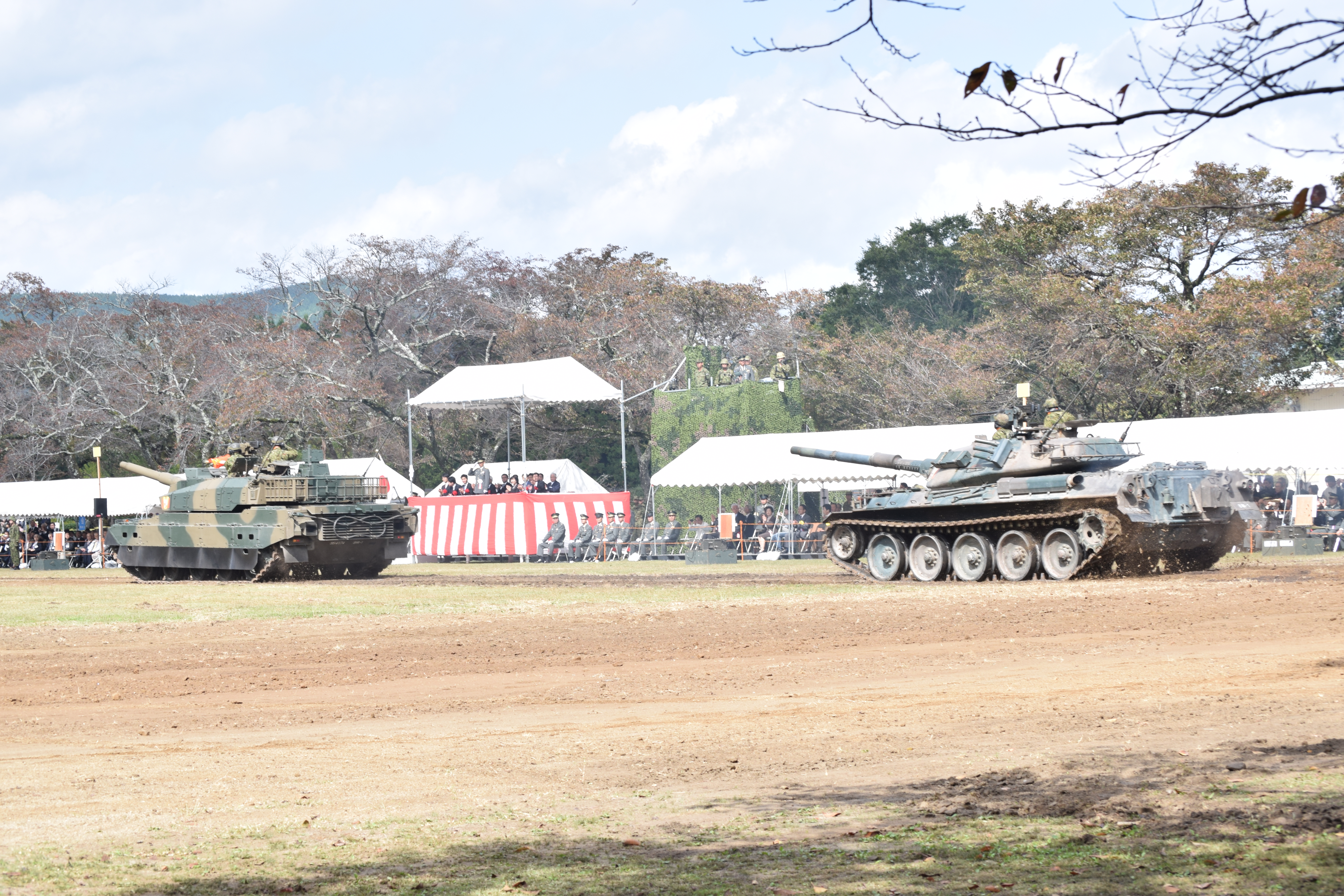 開設記念式典での観閲行進 Nikon D3300